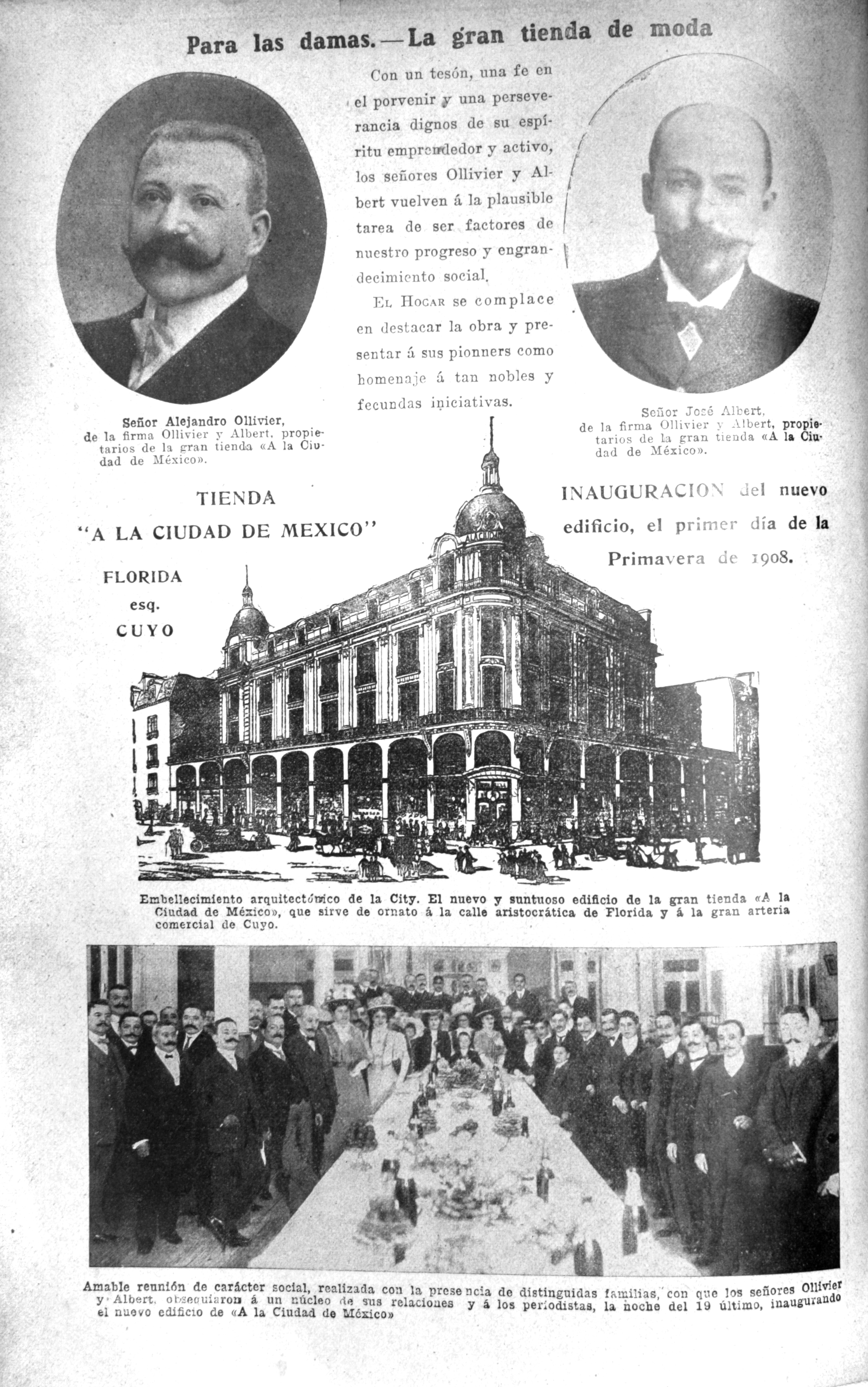 Dessin en 1908 après la reconstruction suite à l'incendie